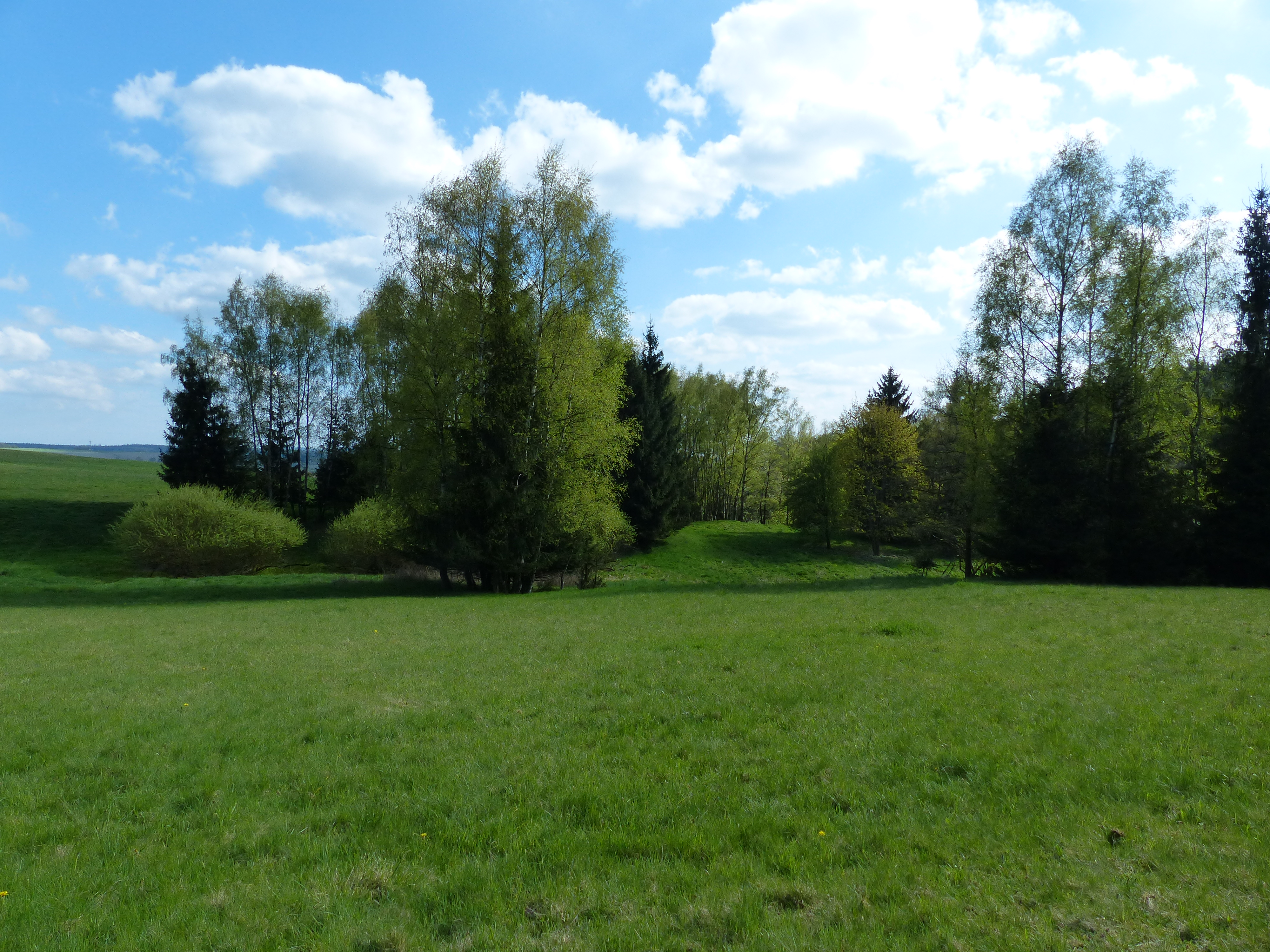 Bilderserie Wüstung Hasenreuth - Geländespuren, Hausbrunnen, Bäume an früheren Zufahrten